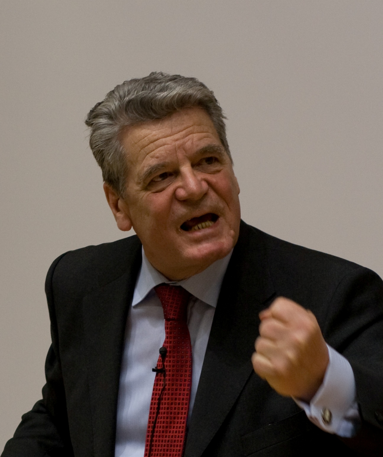 Joachim Gauck im Hasso-Plattner-Institut